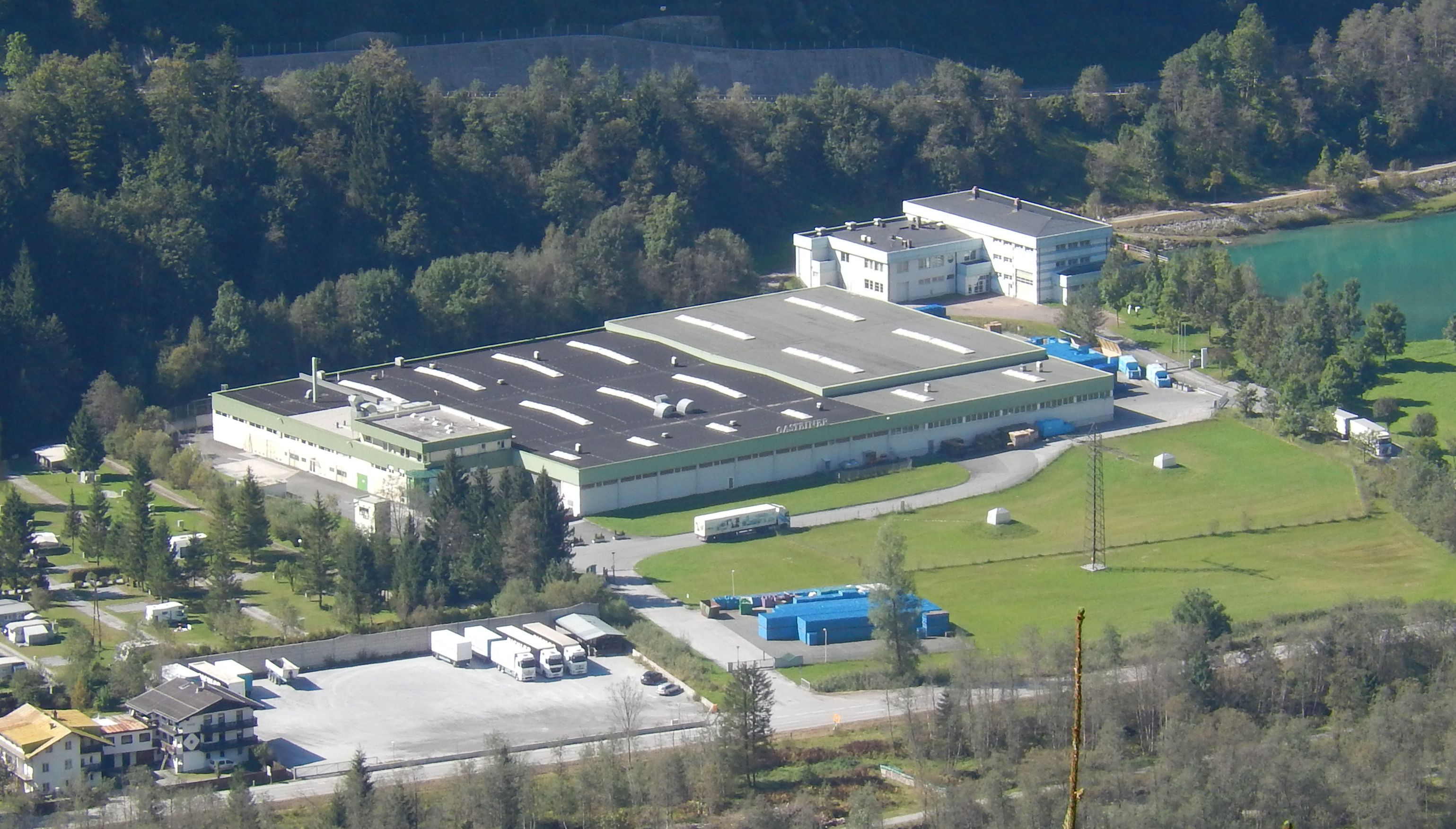 Gasteiner Mineralwasser Firma